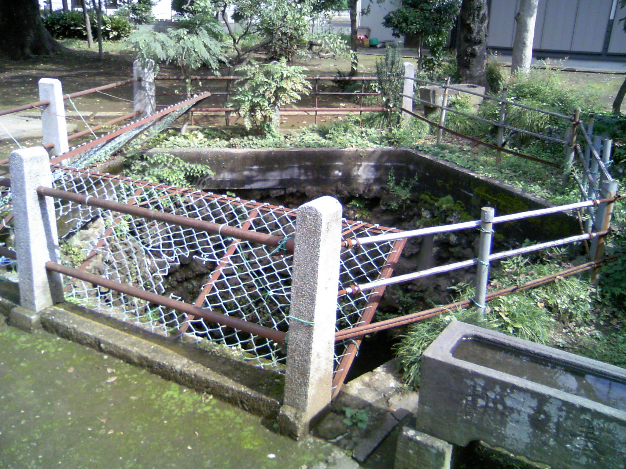 この井戸の水が薬湯に利用された。